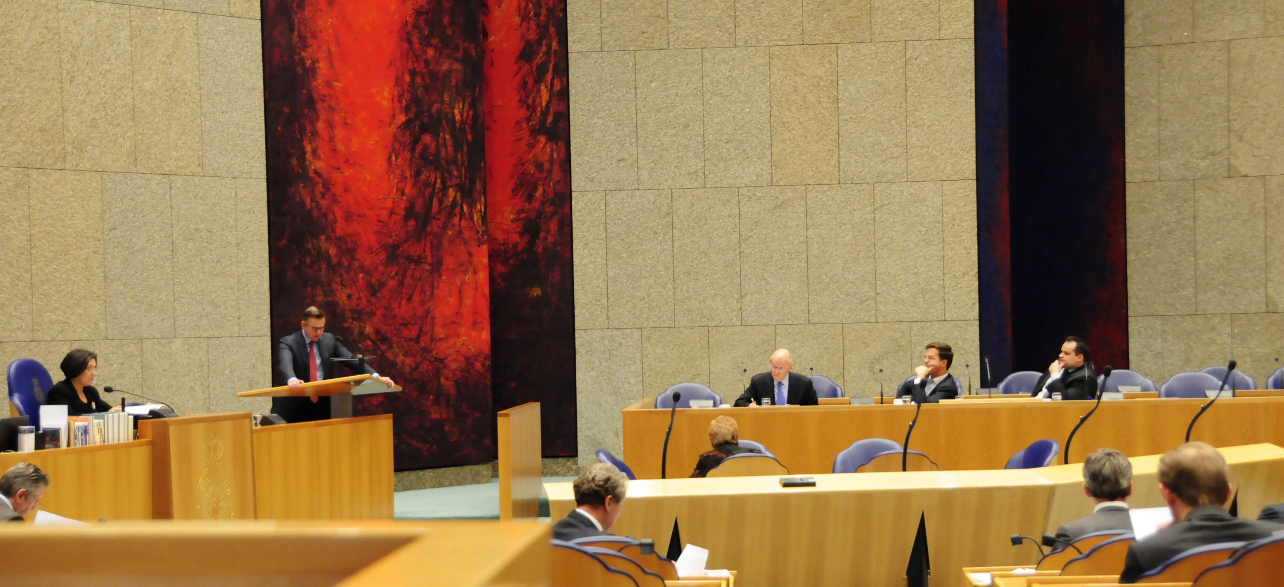 Minister-president Rutte spreekt vrijdag met andere EU-leiders over Libië en de eurozone. Vandaag debatteert hij daarover met de Tweede Kamer.